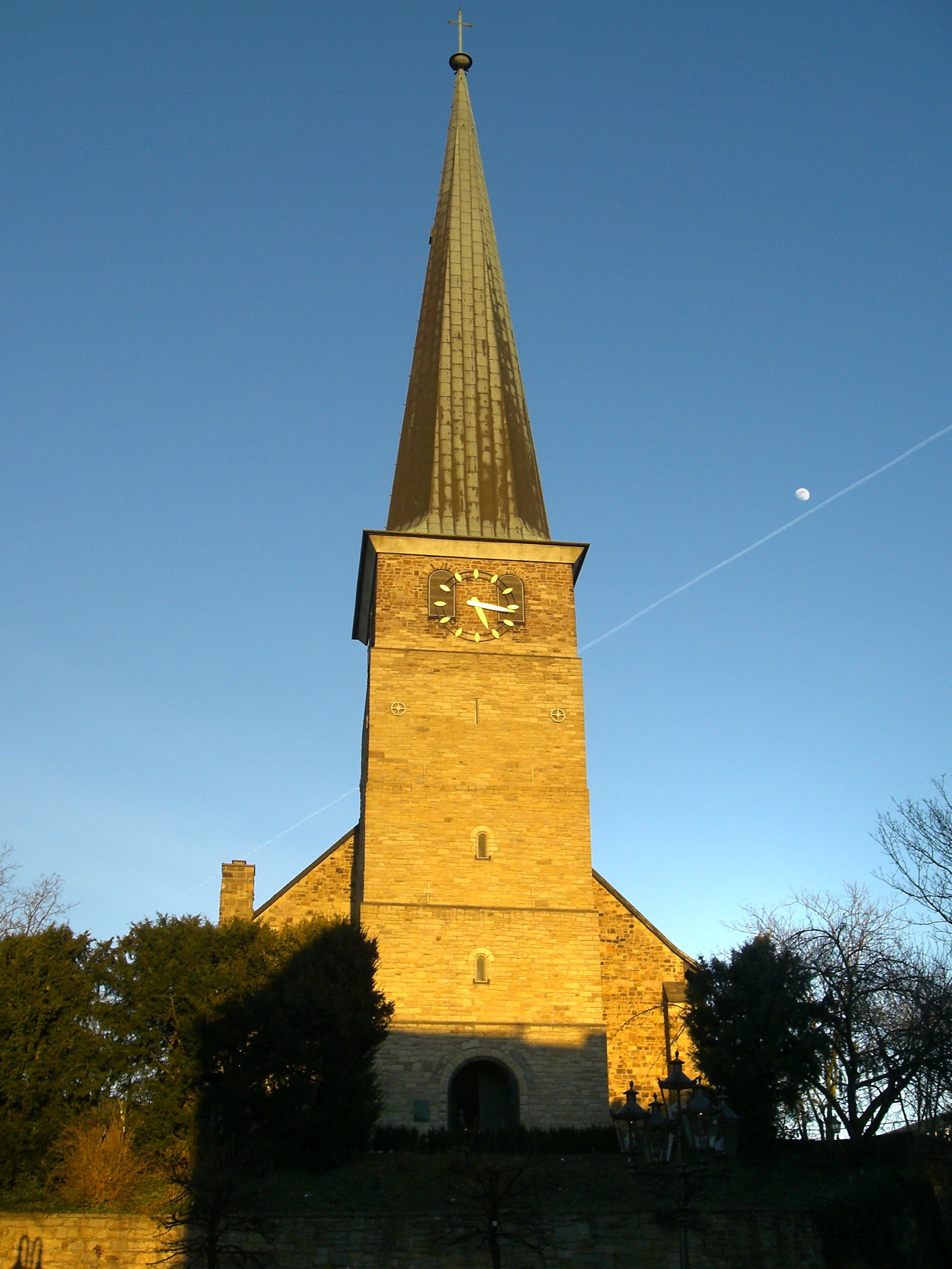 Turm der Petrikirche in Mülheim an der Ruhr